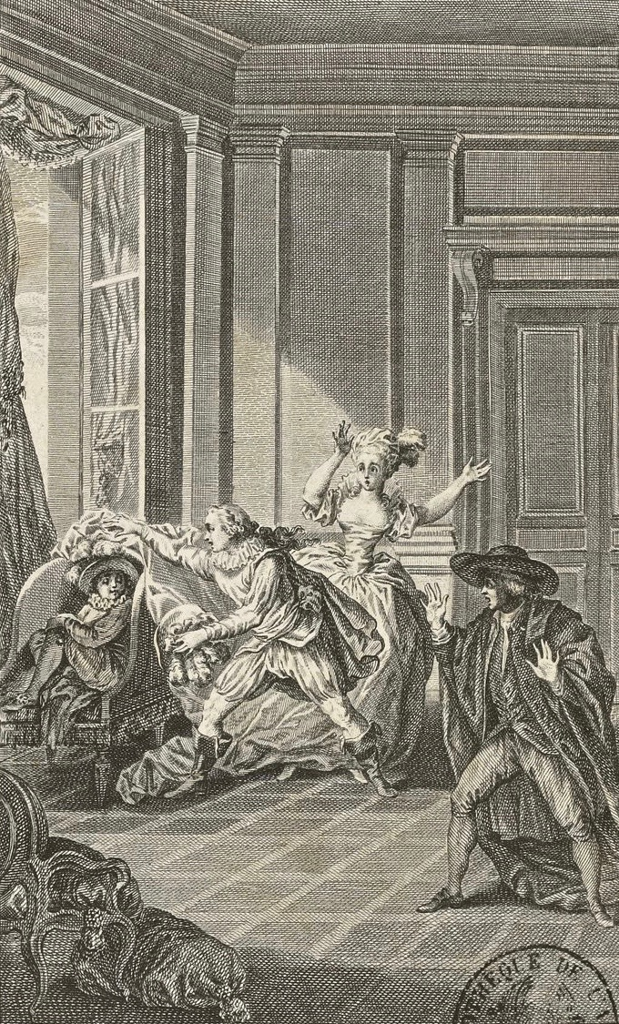 Claude-Nicolas Malapeau (1755-1803) nach Jacques-Philippe-Joseph de Saint-Quentin (* 1738): Illustration zum 1. Akt in der Erstausgabe von "Le mariage de Figaro" von Pierre-Augustin Caron de Beaumarchais (1732–1799), Ruault, Paris 1785. Bibliothèque nationale de France.